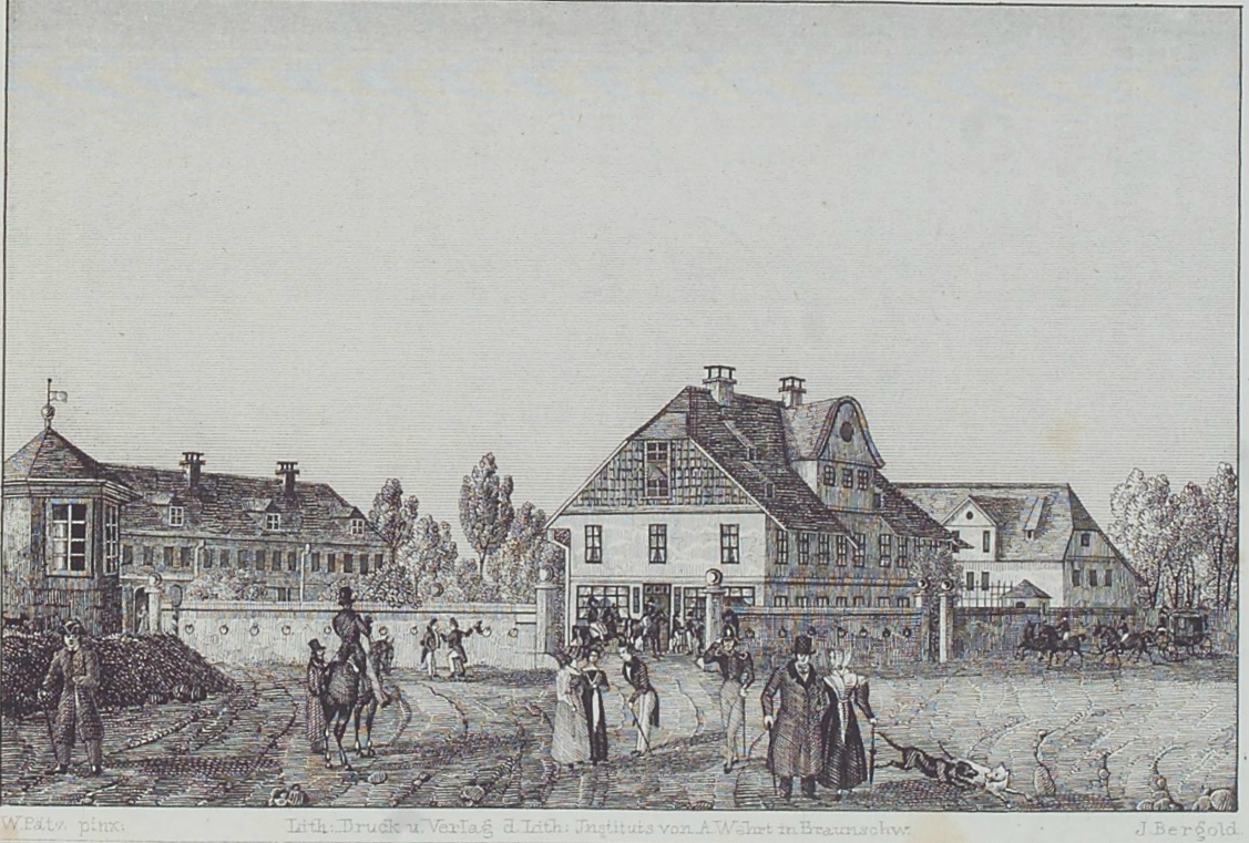 Das Weiße Ross in Braunschweig. Celler Straße, Ecke Hildesheimer Straße.